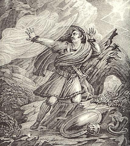 Svyatopolk Forgiven